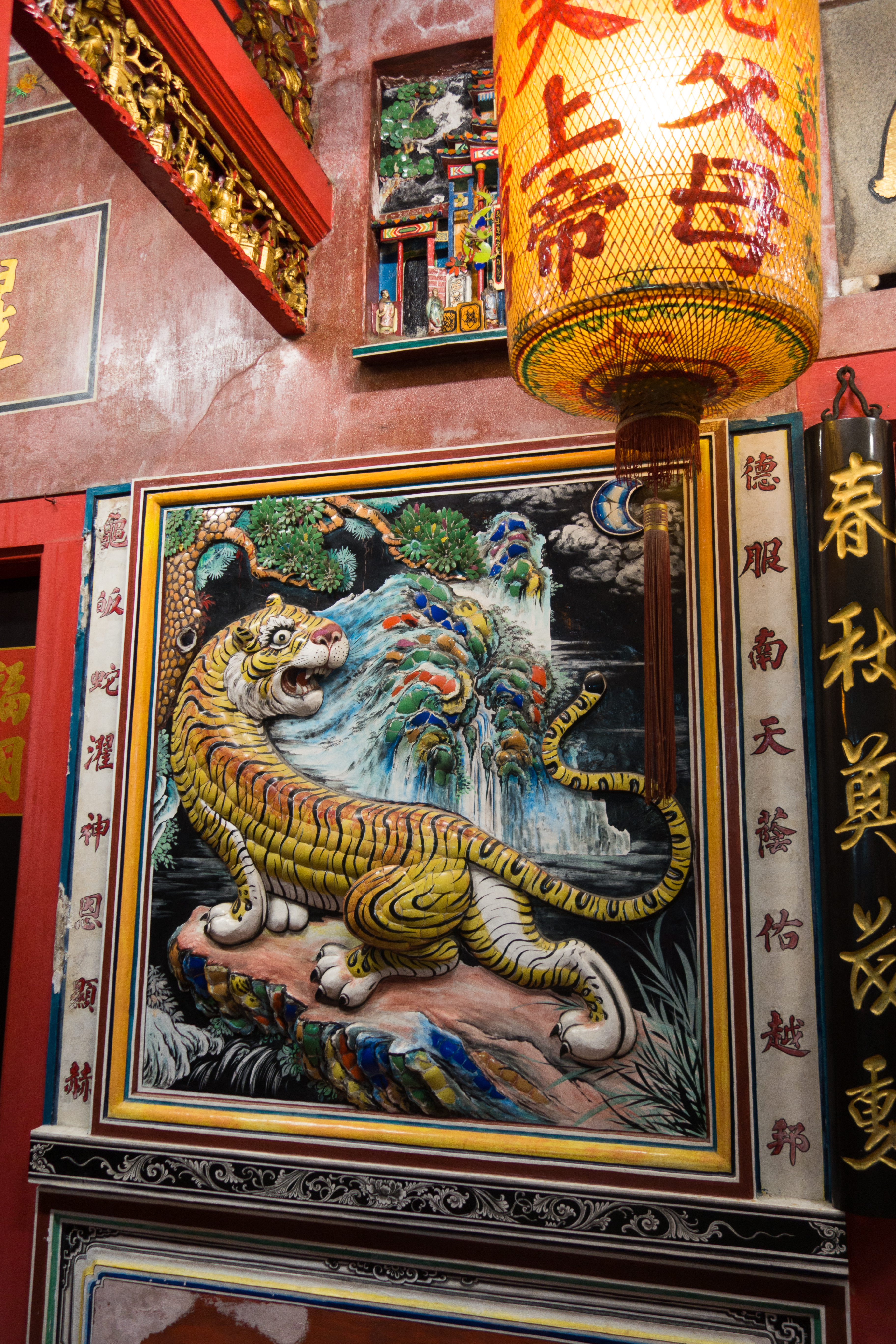 Kuching, Sarawak, Borneo, Malaysia